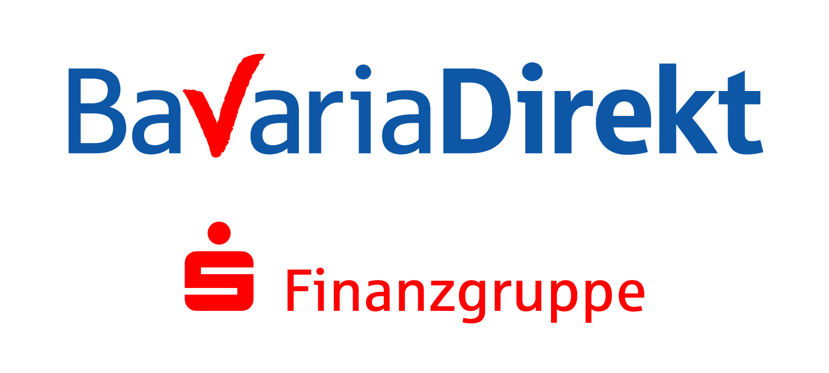 Offizielles Logo der Marke BavariaDirekt